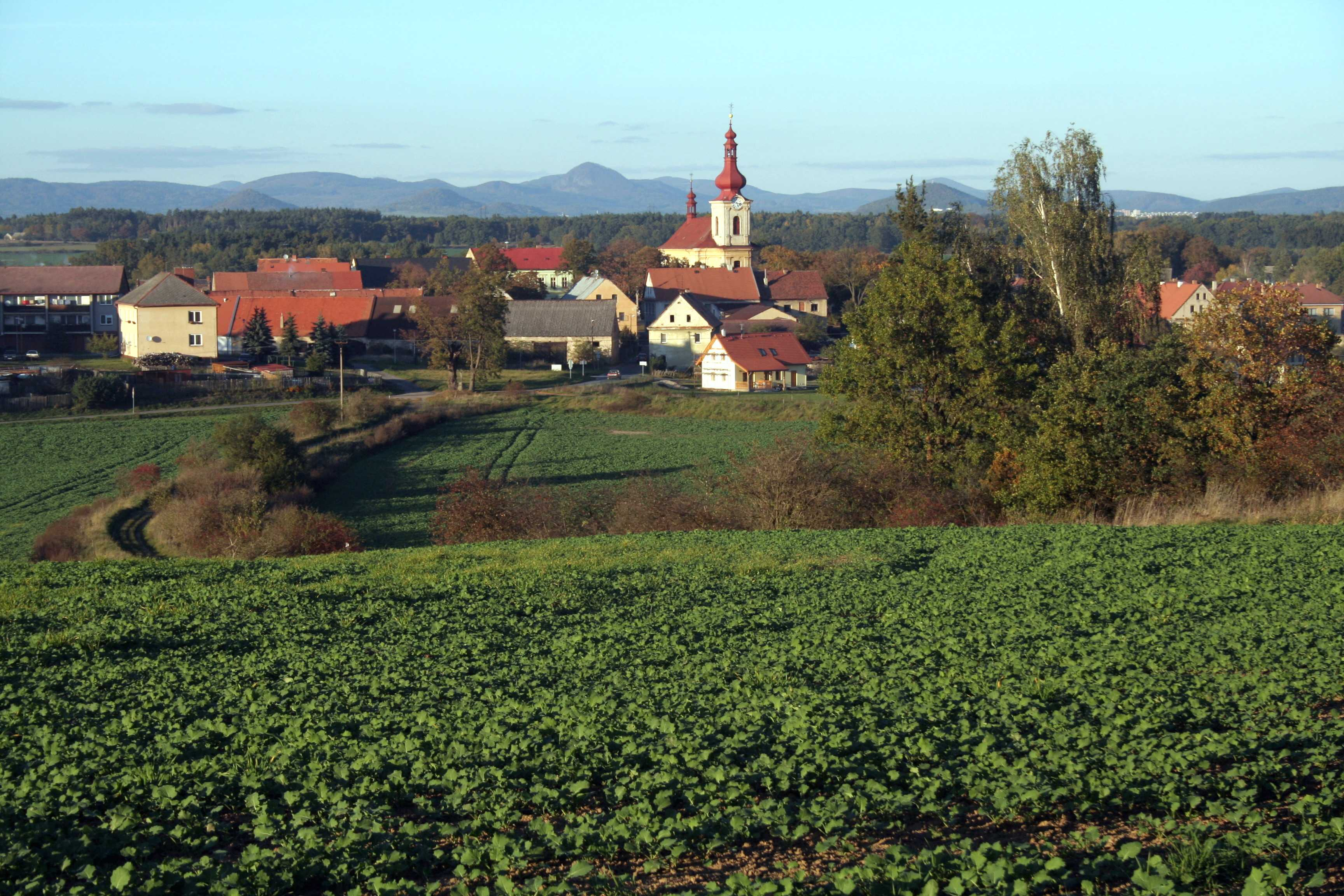 Ortsansicht Hohlen